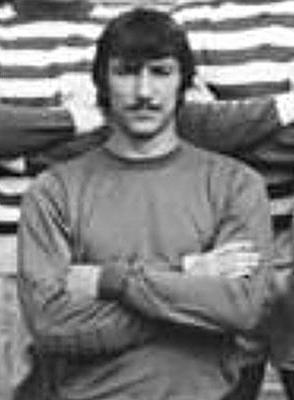 Ausschnitt aus Mannschaftsfoto FC Carl Zeiss Jena, 16.9.83